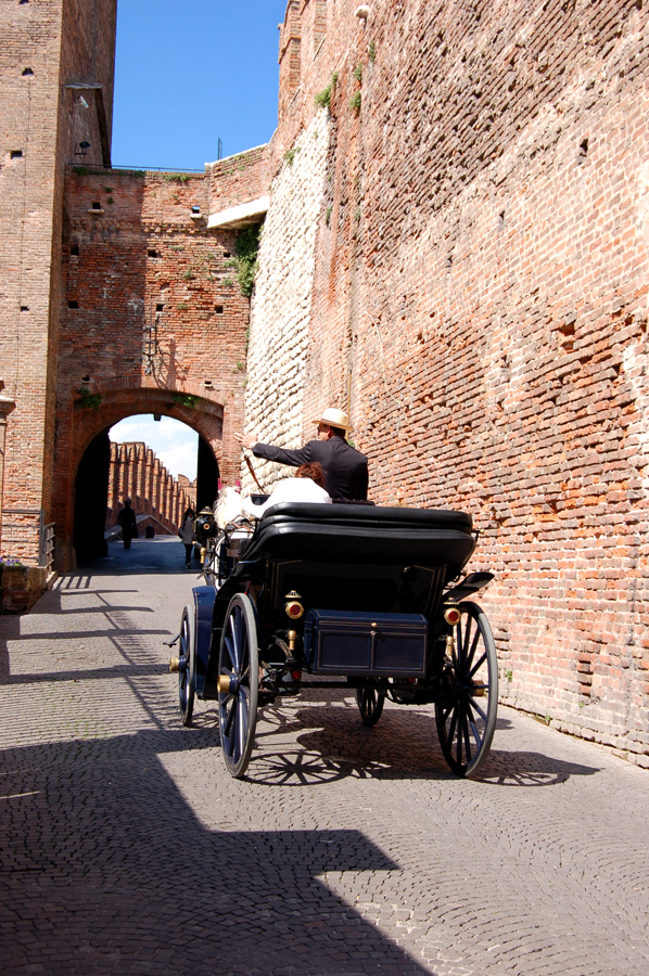 Interno di Castel Vecchio a Verona